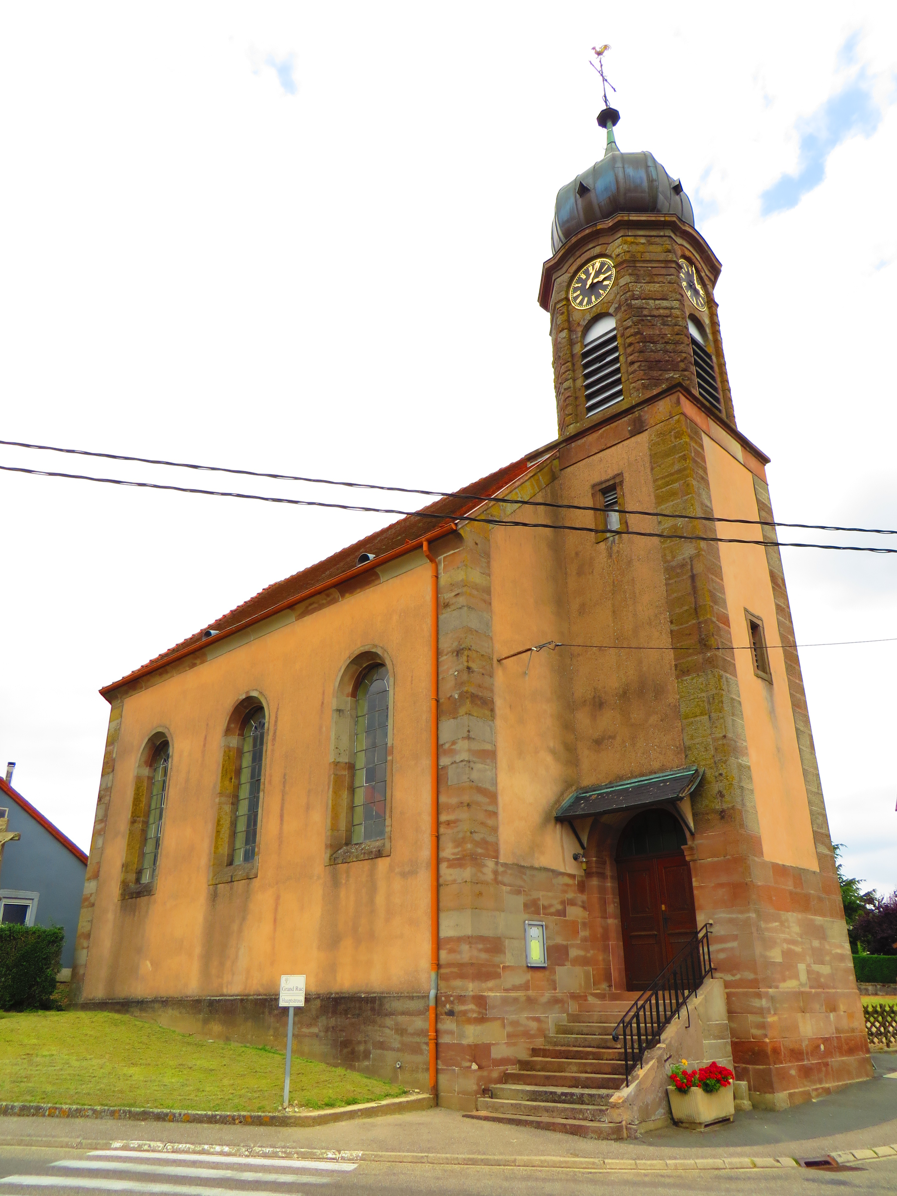 Kirrberg 67 Église Luthérienne